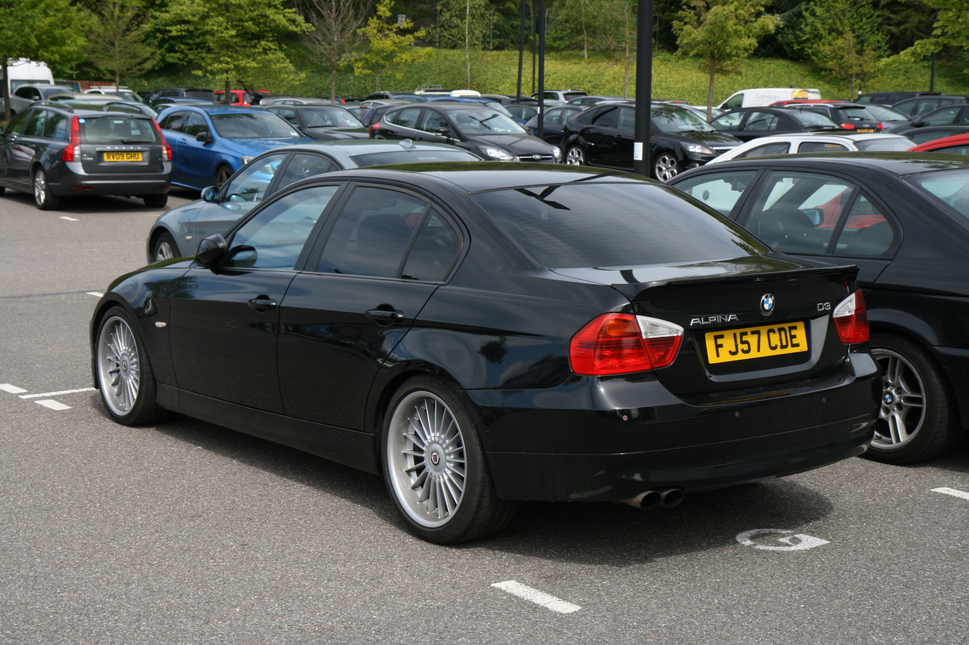 2007 BMW Alpina D3